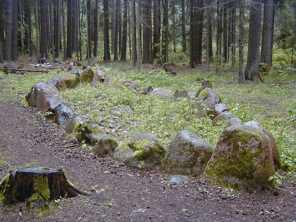 Bīlavu Velna laiva 2004-08-13